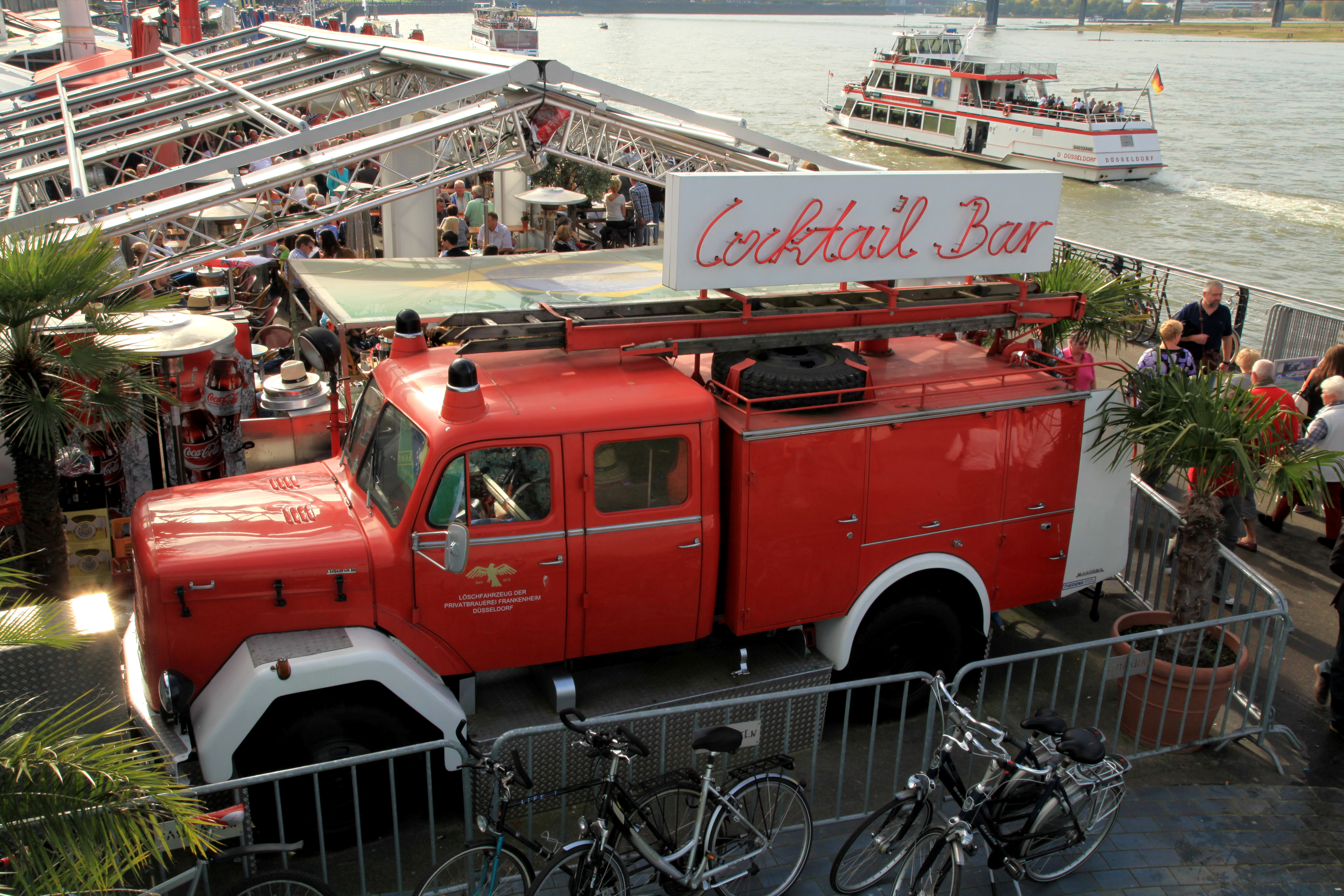 Unteres Rheinwerft in Düsseldorf